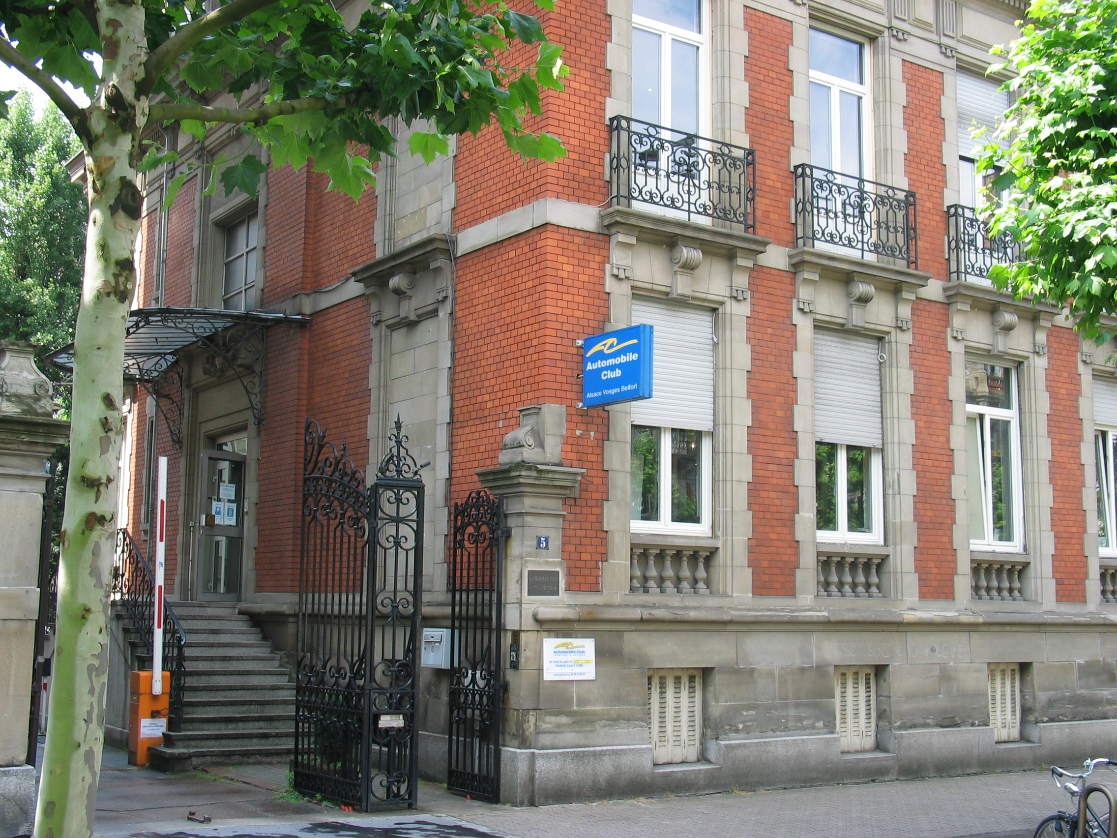 Façade du siège de L'Automobile Club, 5 avenue de la Paix, 67000 Strasbourg